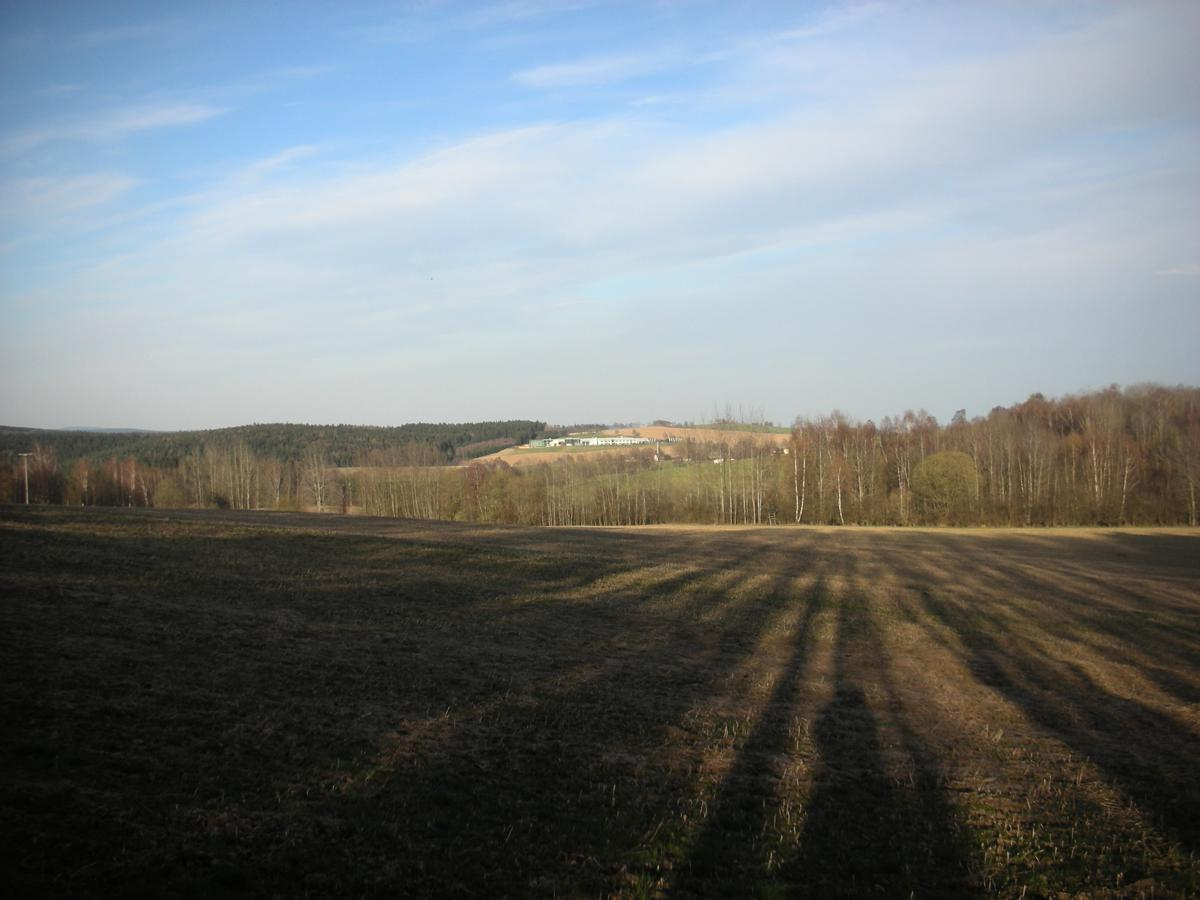 Vogtlandpanoramaweg, Blick in Oberbrambach zum Sprudelwerk